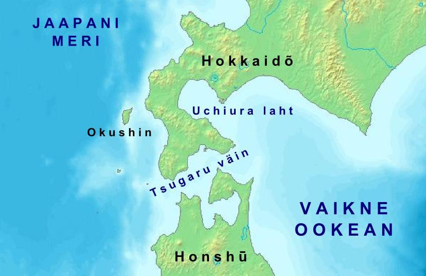 Kaart on tehtud DEMIS Mapserveri kaardi alusel ja pärast oli lisatud kohanimed.